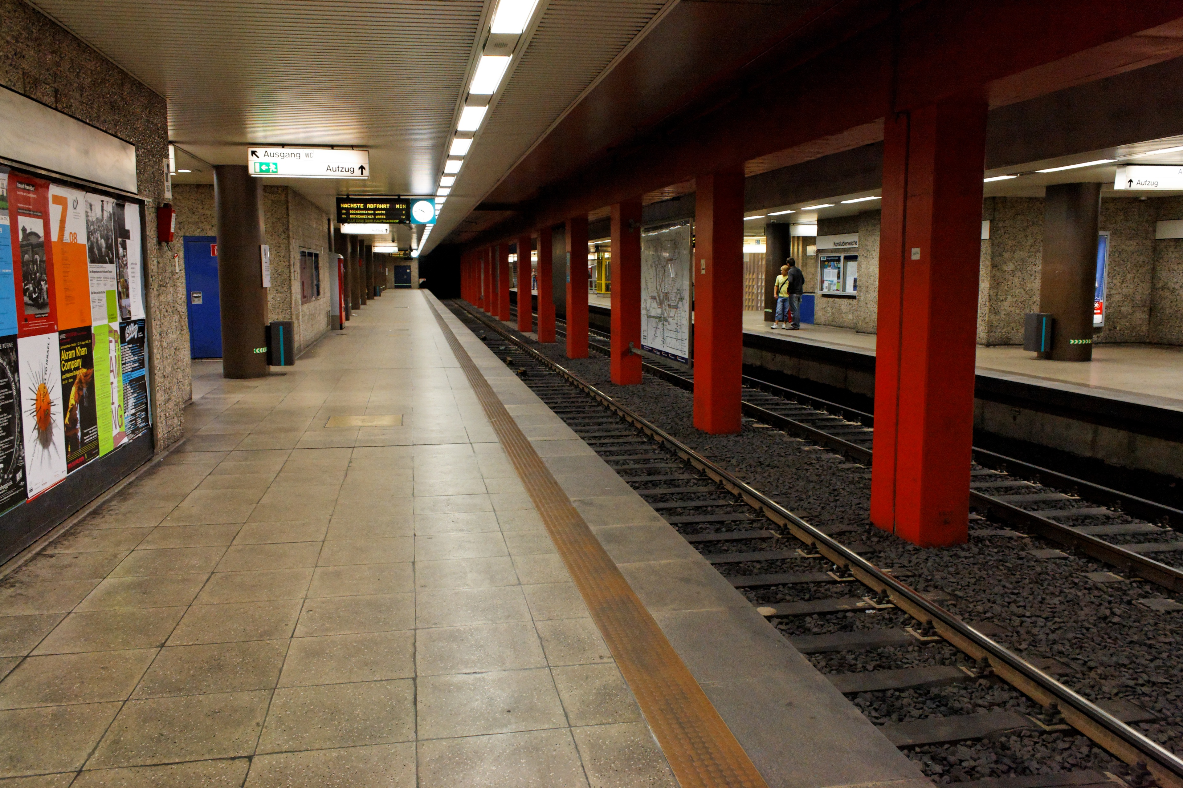 U-Bahn-Station Konstablerwache der U-Bahn Frankfurt